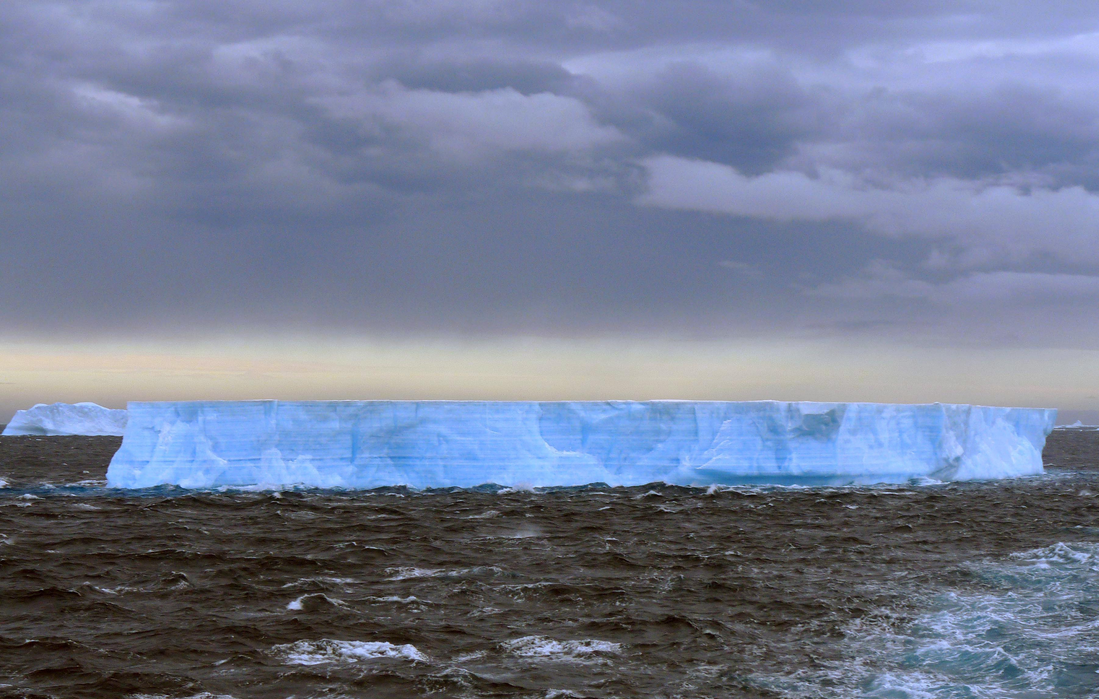 Blue Tabular Iceberg